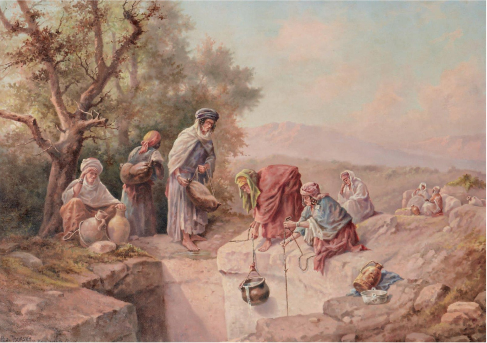 Citerne romaine à Bou-Laredjia près Souk el-Arba (Tunisie)